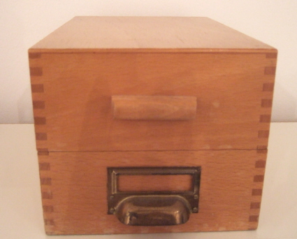 Alter Holz-Karteikasten